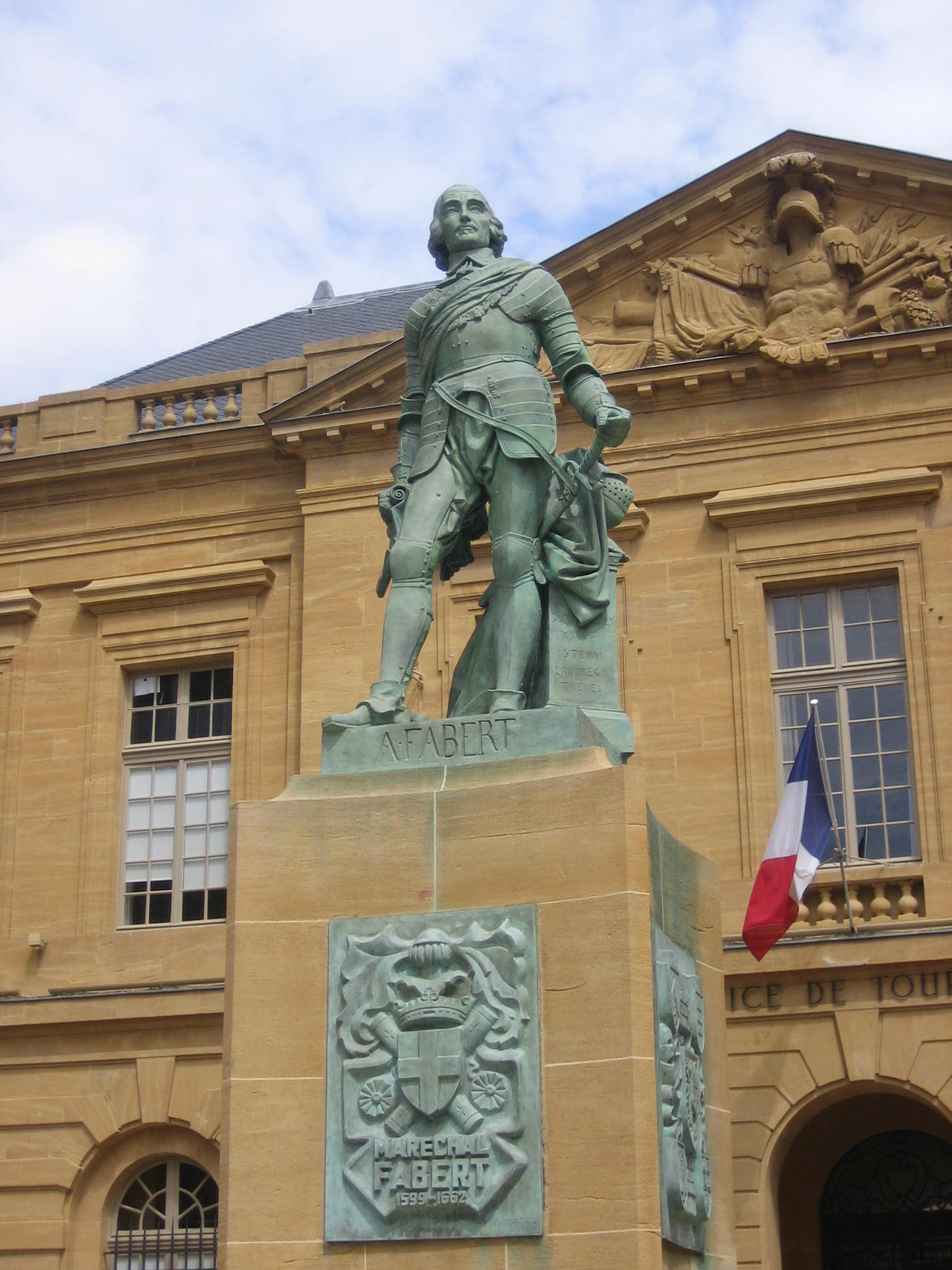 La statue de Abraham de Fabert d'Esternay, maréchal de Louis XIV, devant le corps de garde sur le Place d'Armes à Metz.